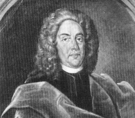 Zeichnung/Gemälde, abgebildet: Erich Philipp Ploennies